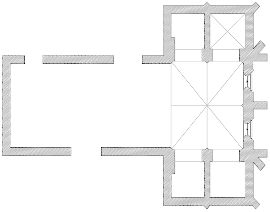 Primitiva planta de la iglesia de San Juan de Miranda de Ebro.